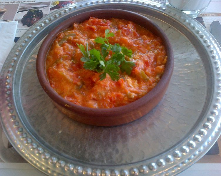 Menemen